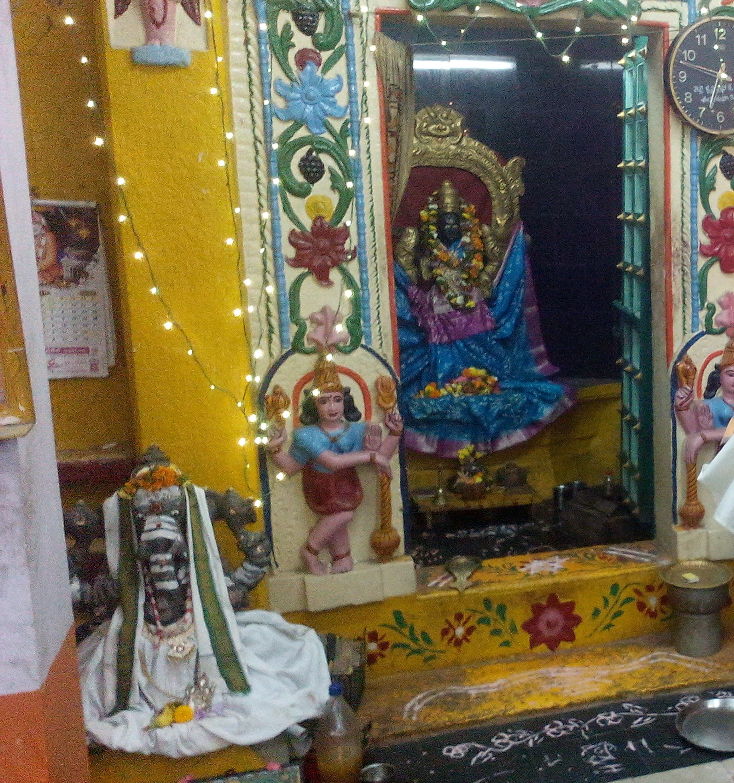 శ్రీ వాసవి కన్యకాపరమేశ్వరి అమ్మవారి దేవాలయము, ఈపూరుపాలెం